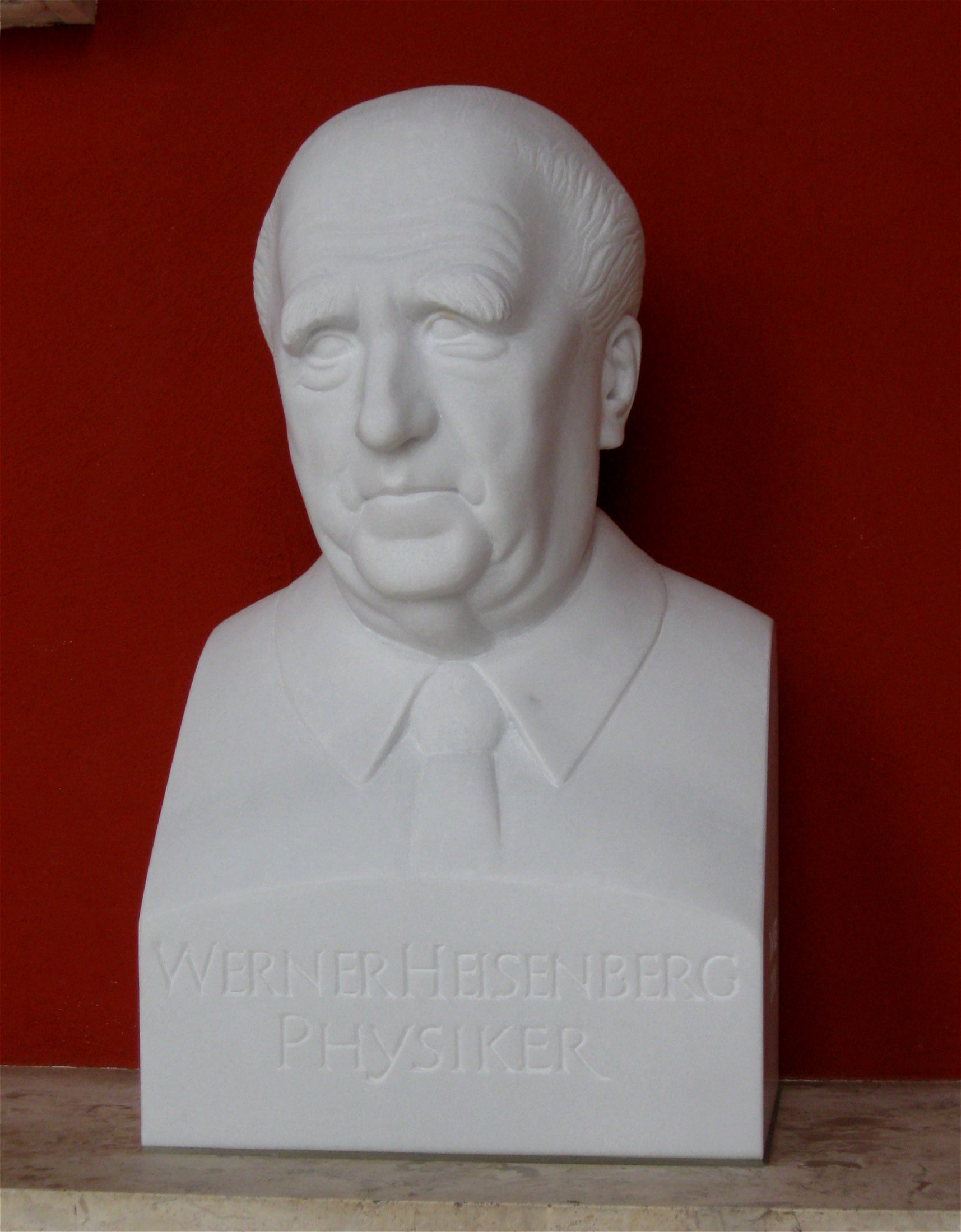 Ruhmeshalle München: Werner Heisenberg Physiker (im Jahre 2009 neu aufgestellt)